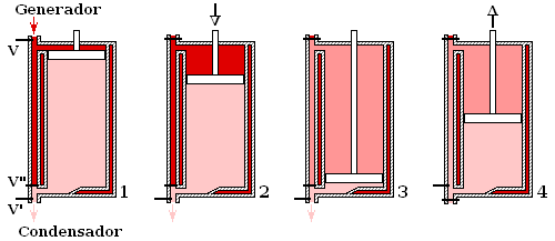 Watt Machine (schema)